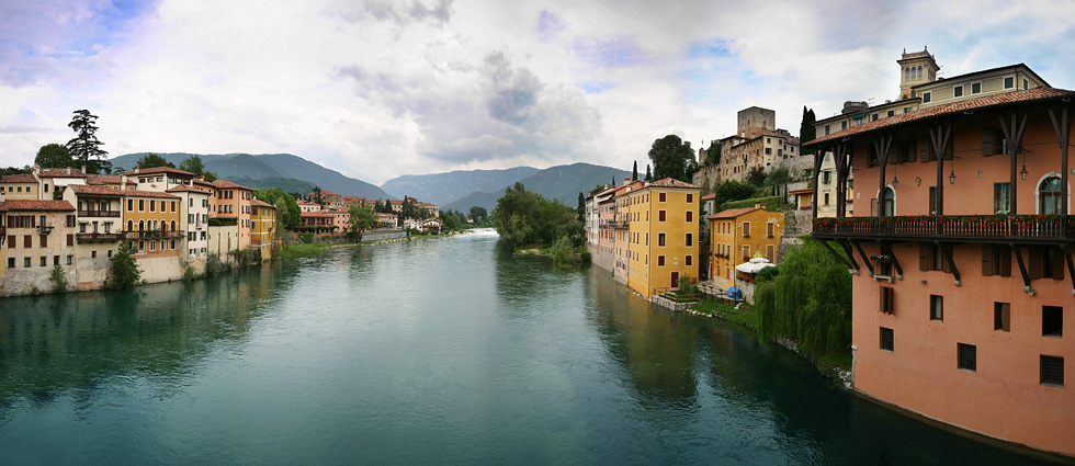 Bassano del Grappa, Veneto, Italien, von der Ponte degli Alpini aus